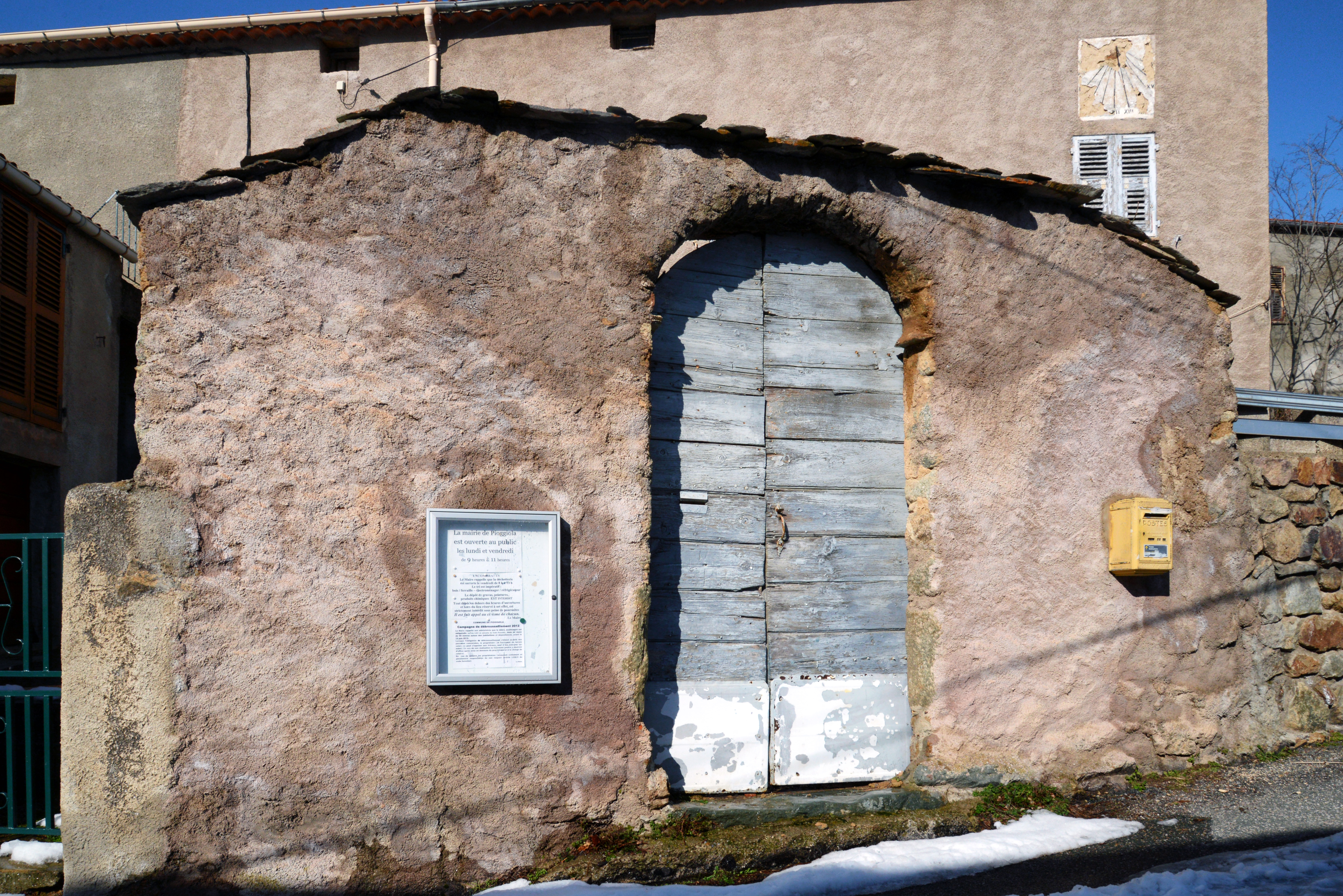 Pioggiola, Giussani (Haute-Corse) - La mairie de Pioggiola à Forcioli